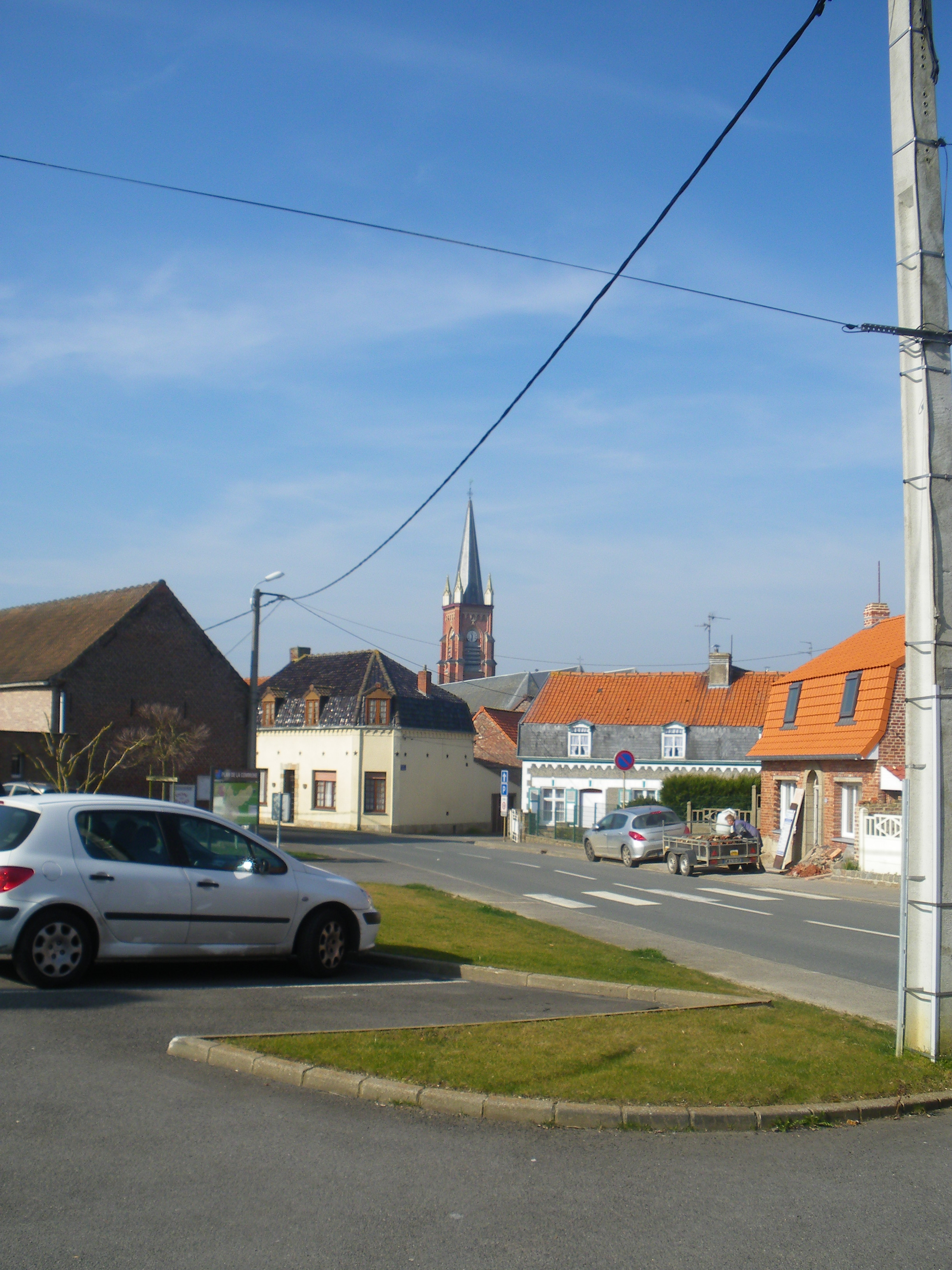 Vue d'ensemble de Winnezeele, au fond l'église.